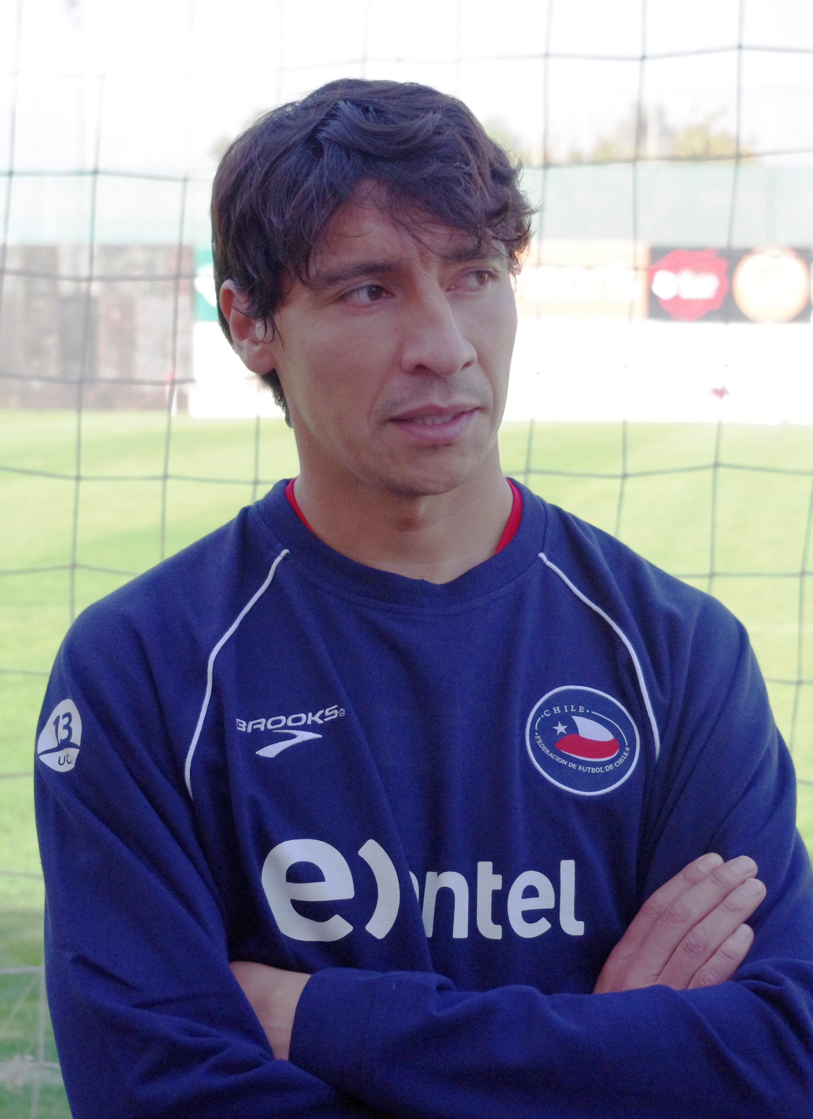 Pablo Contreras